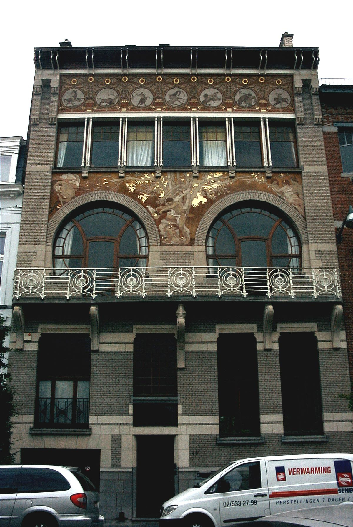 Paul Hankar tervezésű ház, a Horta ház környéke – szecessziós városnegyed, Brüsszel